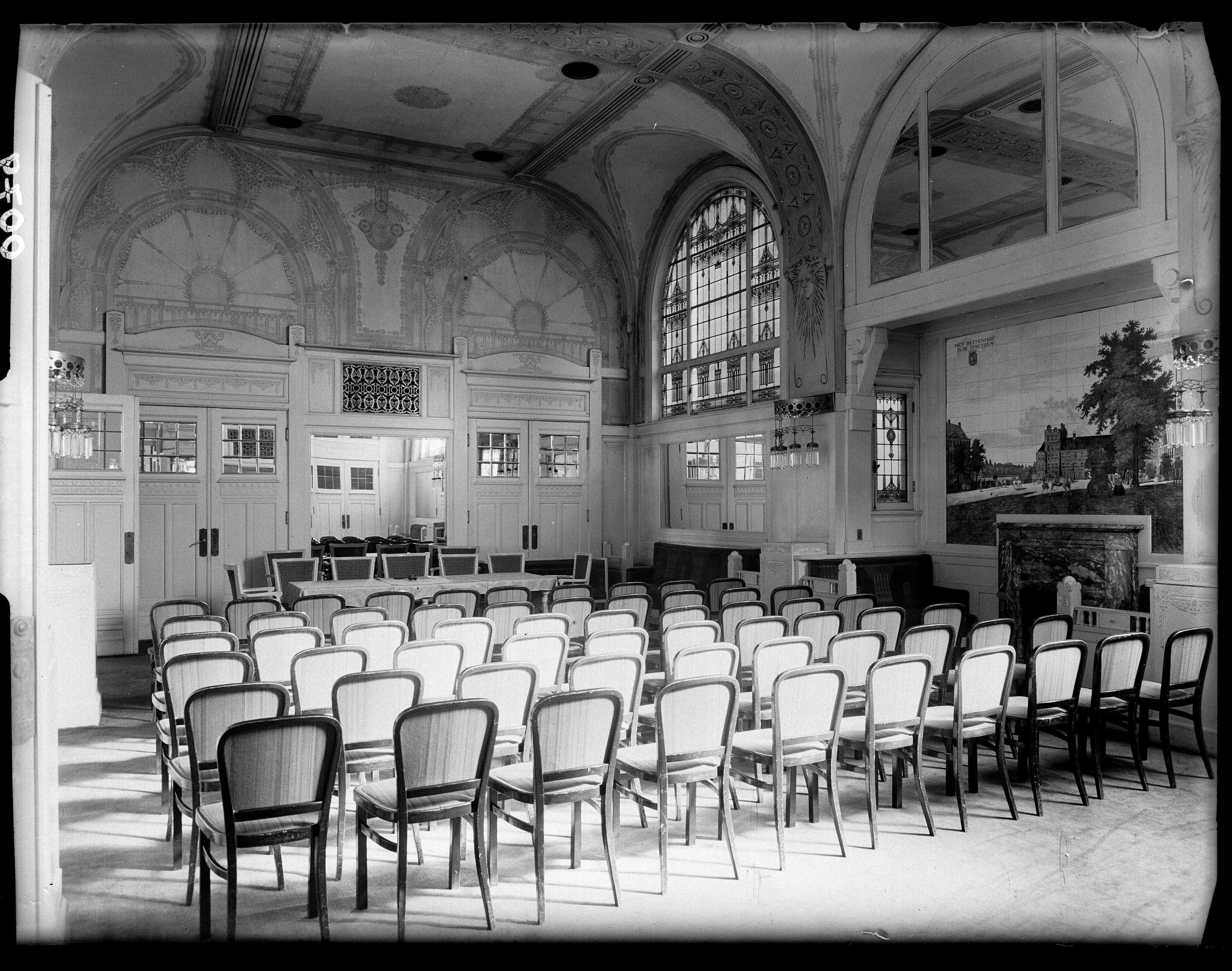 Buitenhof 20 in Den Haag. In 1934-1935 verbouwd tot Cineac.